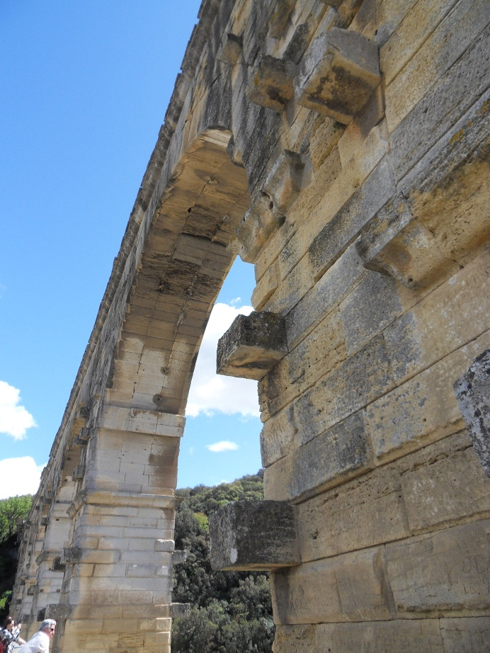 Partie de la paroi du Pont du Gard où on peut voir les pierres saillantes qui servaient d'appui aux échafaudages